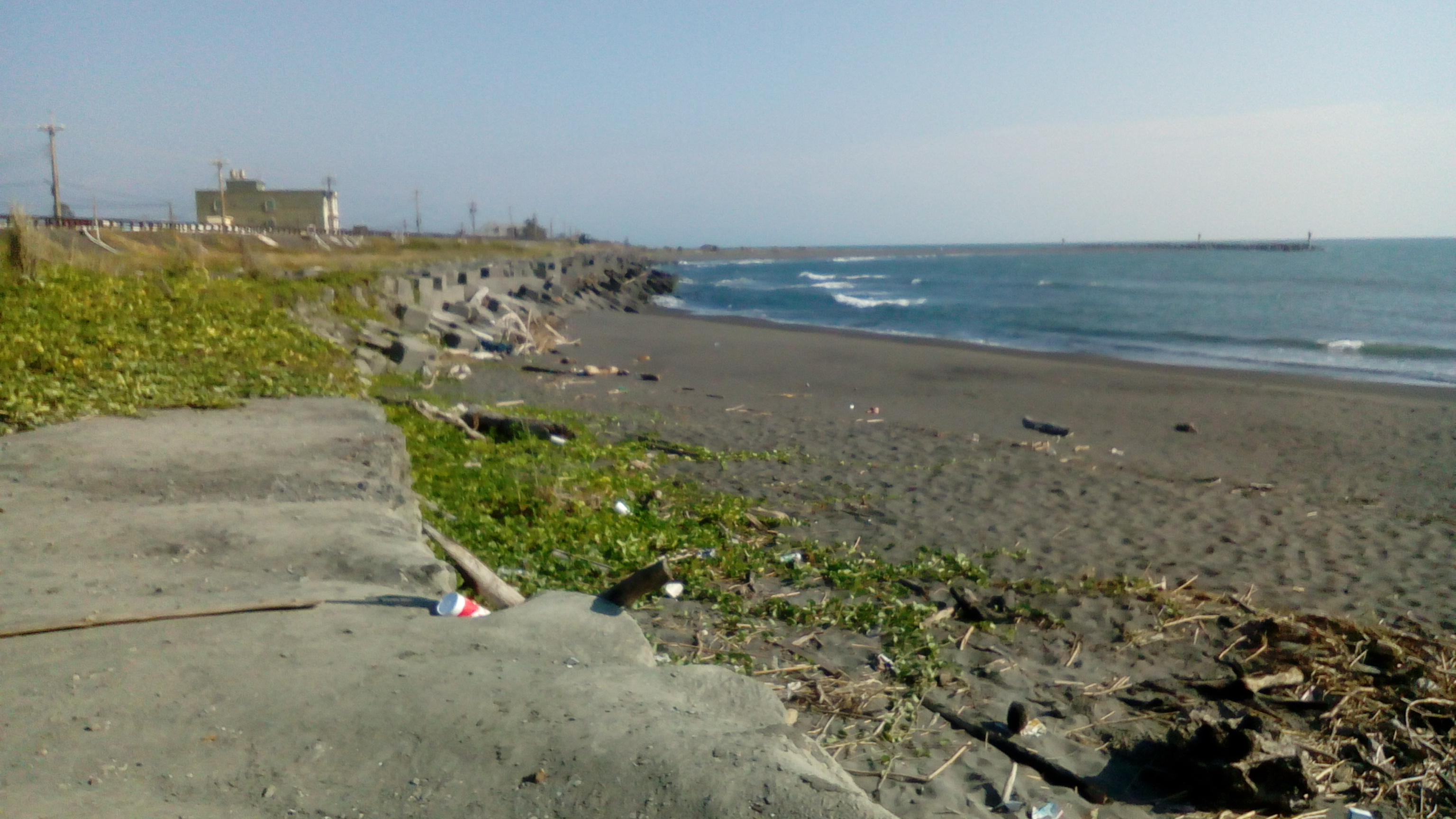 大鵬灣與台灣海峽連通處